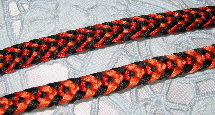 Kumihimo braid